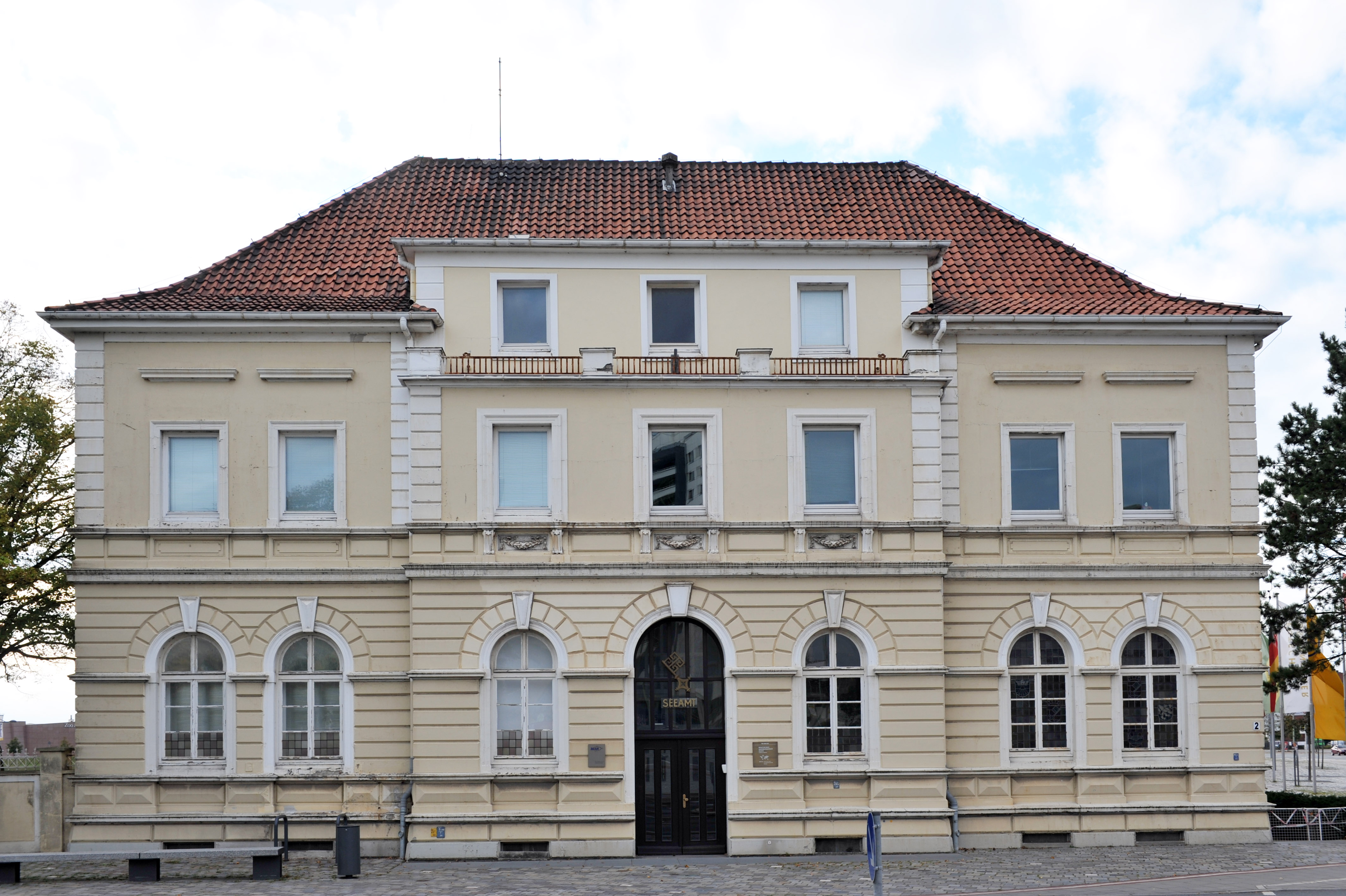 Seeamt, Keilstraße 3 in Bremerhaven; one of the oldest buildings in town (prior to restauration) gebaut 1897/1898 für die bremische Hafenverwaltung; danach Seeamt bis dieses 2002-06 aufgelöst wurde; seit 2008 wissenschaftliche Abteilung des Deutschen Auswandererhauses mit Museumssammlung seit 2009 Zentrum für Migrationsforschung mit Spezialbibliothek und Sitz der Stiftung Deutsches Auswandererhaus und der BEAN (Bremerhavener Entwicklungsgesellschaft Alter/Neuer Hafen mbH & Co. KG) 2010-04 bis 2010-08 umfassende Restaurierung durch Stäwog (Städtische Wohnungsgesellschaft); (im alten Verhandlungssaal ggf. Einrichtung einer öffentlichen Bibliothek?) Das abgebildete Objekt ist ein geschütztes Kulturdenkmal in der Freien Hansestadt Bremen, mit der Nr. 1544 beim Landesamt für Denkmalpflege registriert.